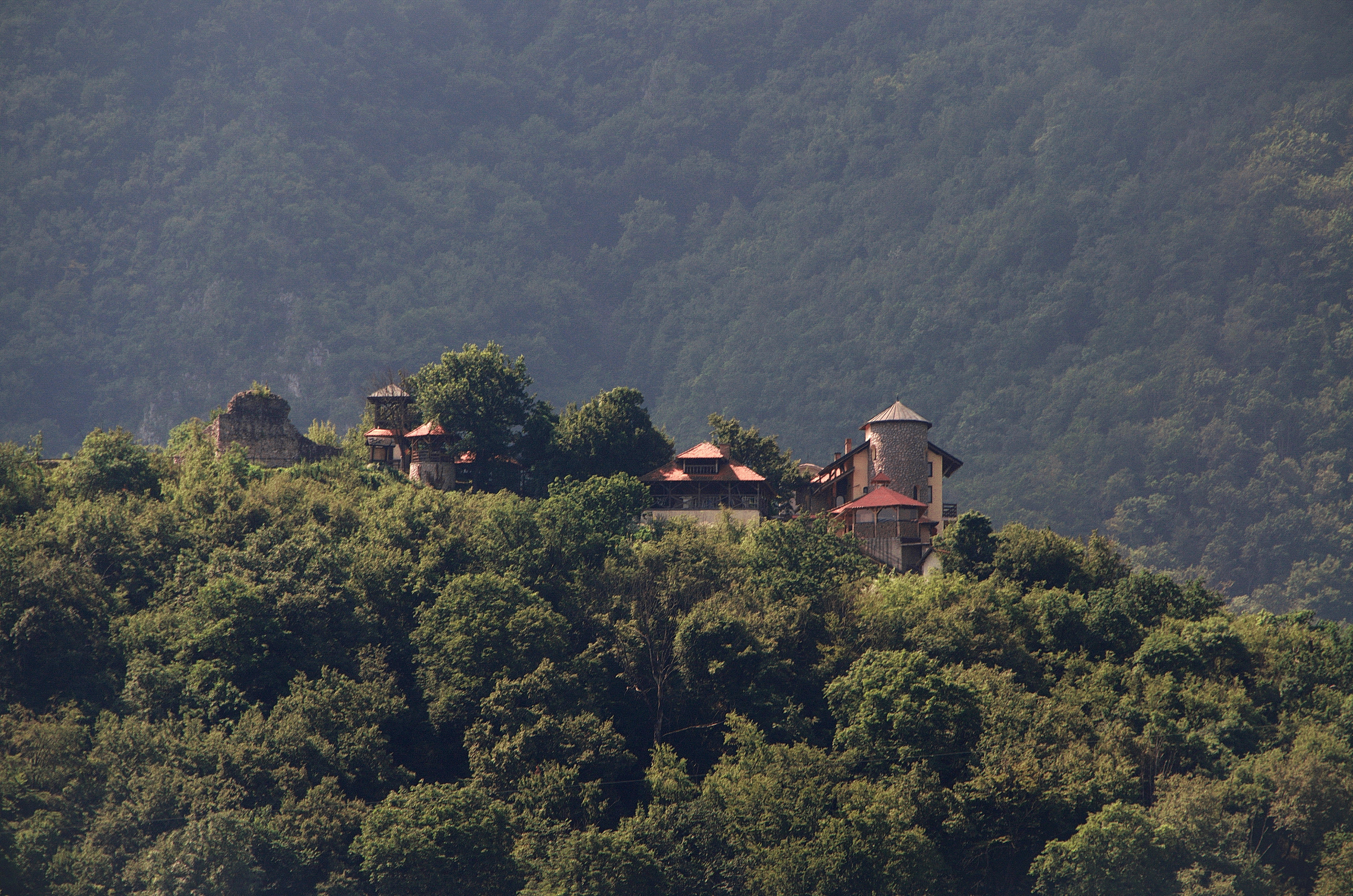 Смештен на доминантно узвишење на централном меандру, видљив са свих страна клисуре.